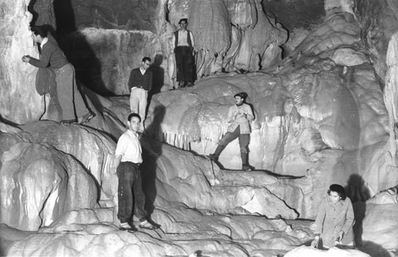 Bioespeleologo katalanak eta gipuzkoarrak Kilixketako koban (Aralar).